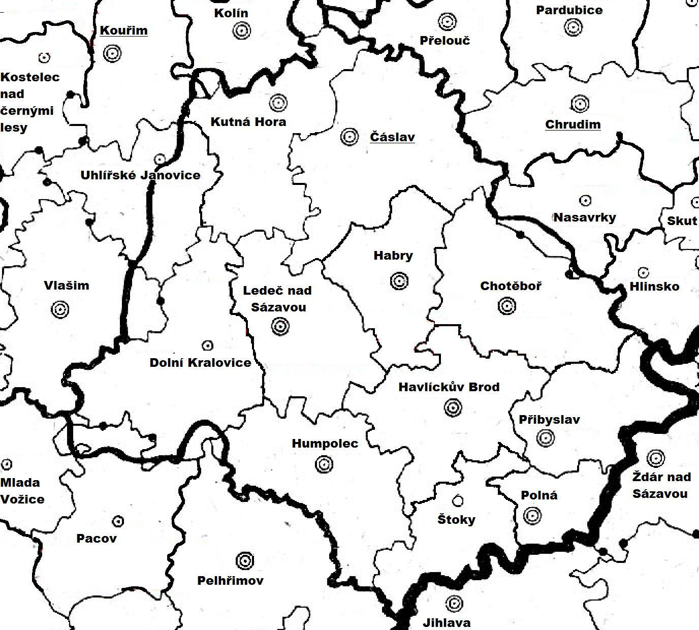 Soudní okresy zasahující do Čáslavského kraje do roku 1849